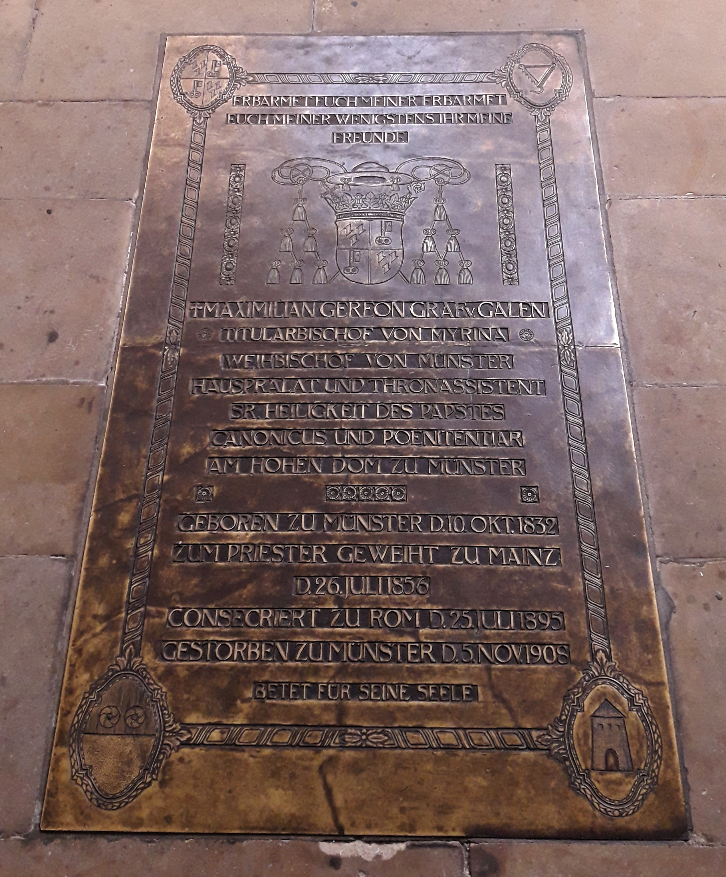 Grab des Weihbischofs Maximilian Gereon von Galen (1832–1908) in der Maximuskapelle des Domes zu Münster/Westfalen, Deutschland